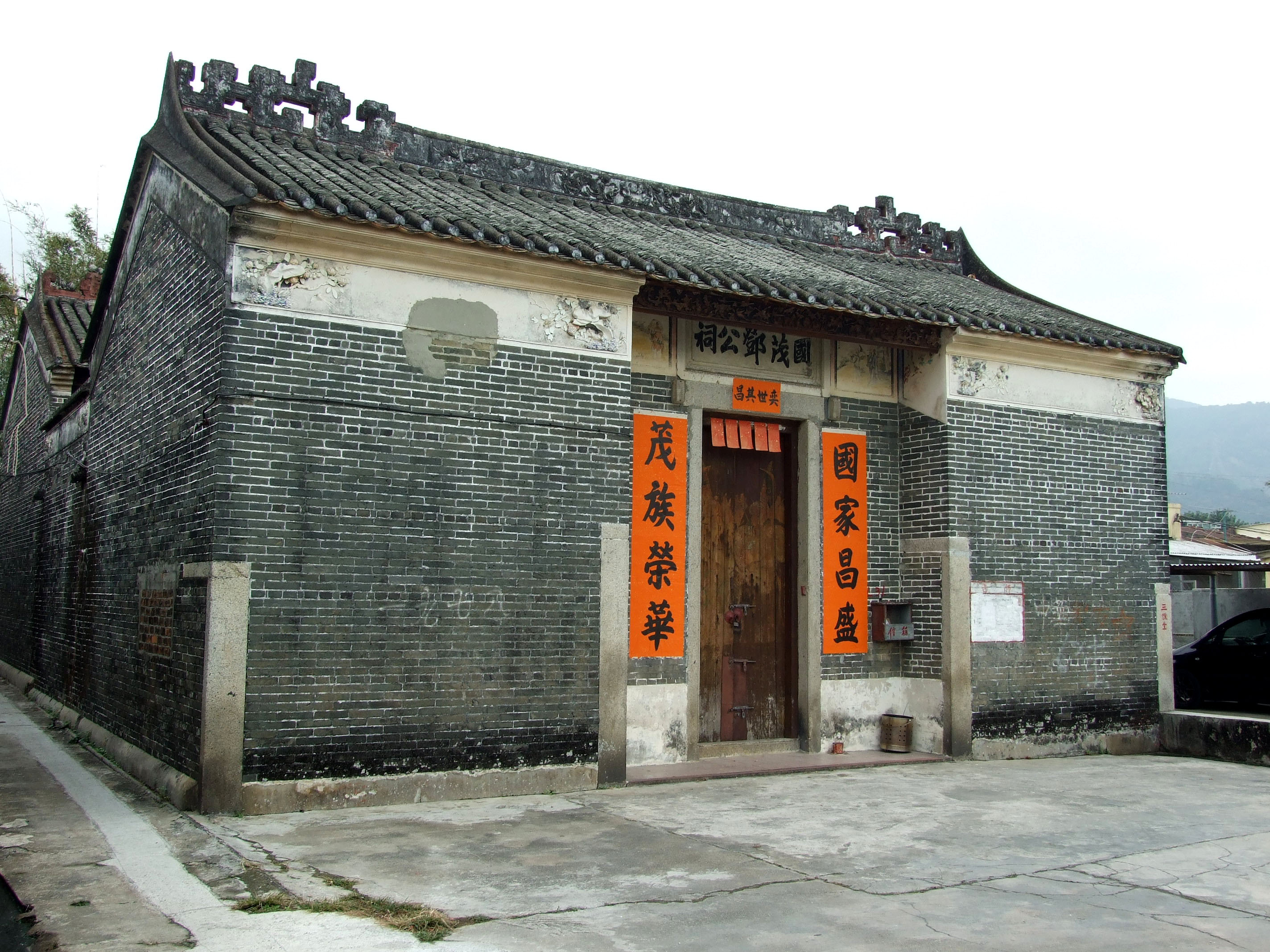 中文（香港）: 八鄉水流田國茂鄧公祠